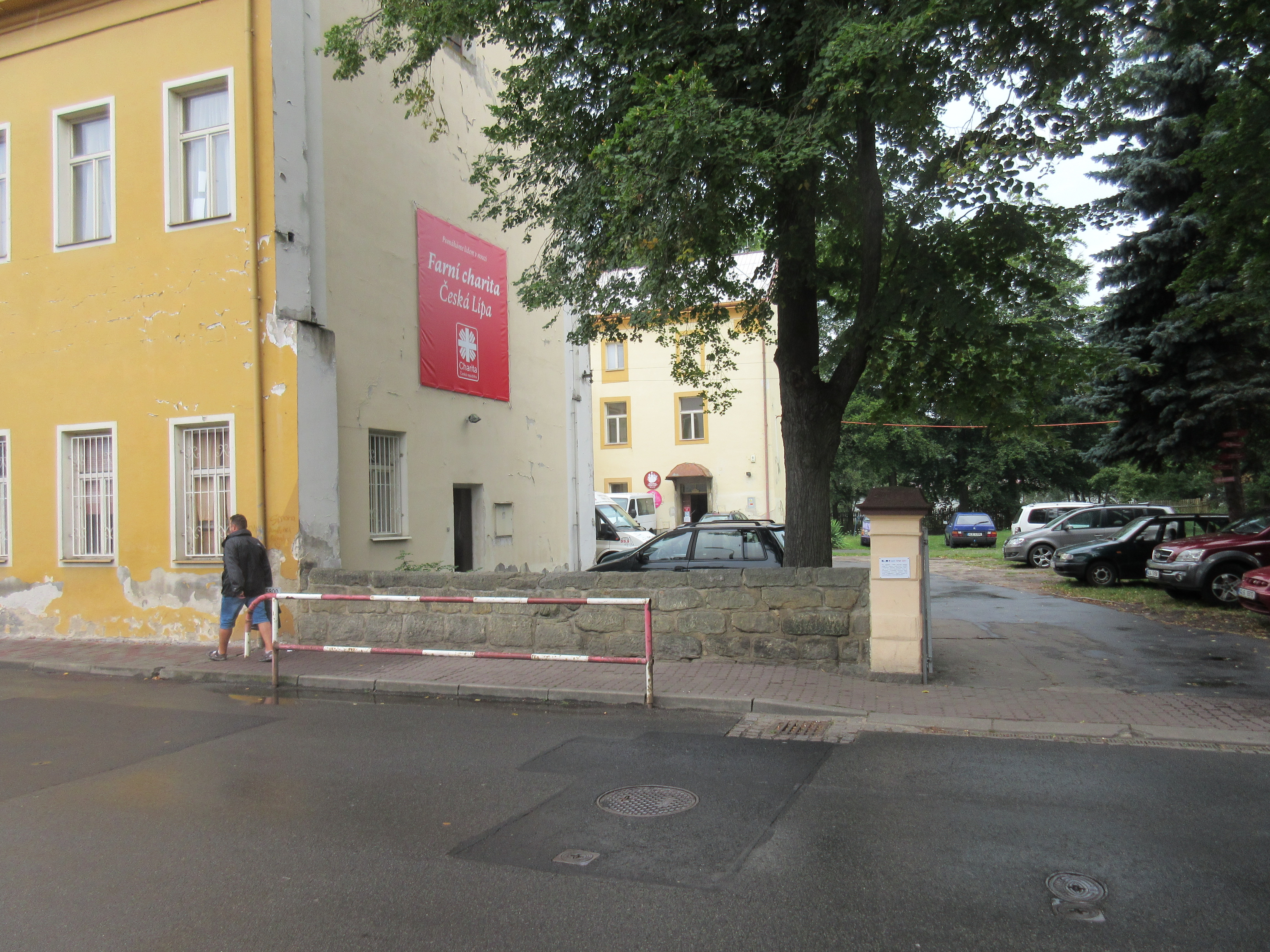 Budovy charity v České Lípě